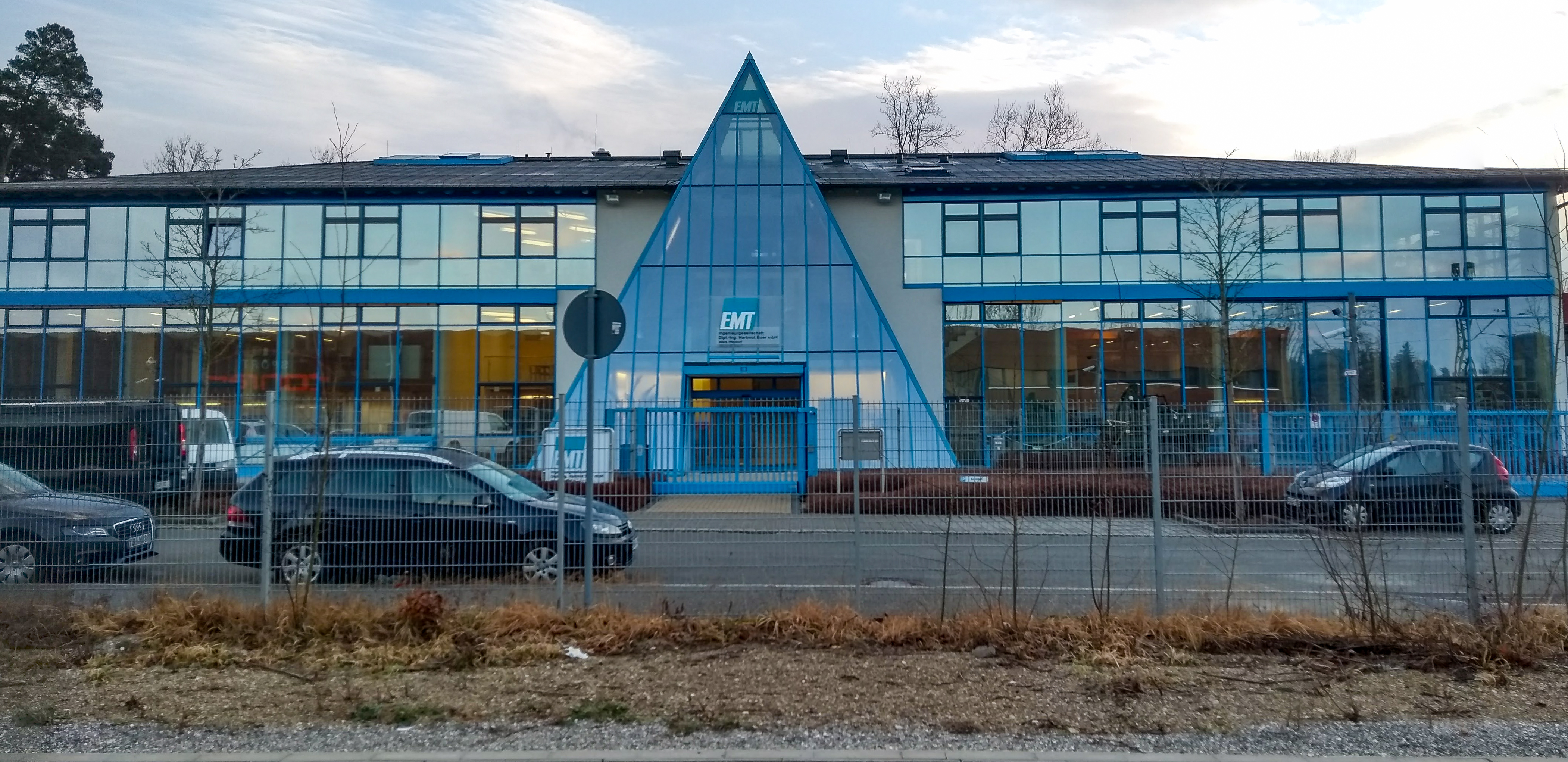 Werk von EMT Penzberg in Iffeldorf, gesehen vom Bahnhof.